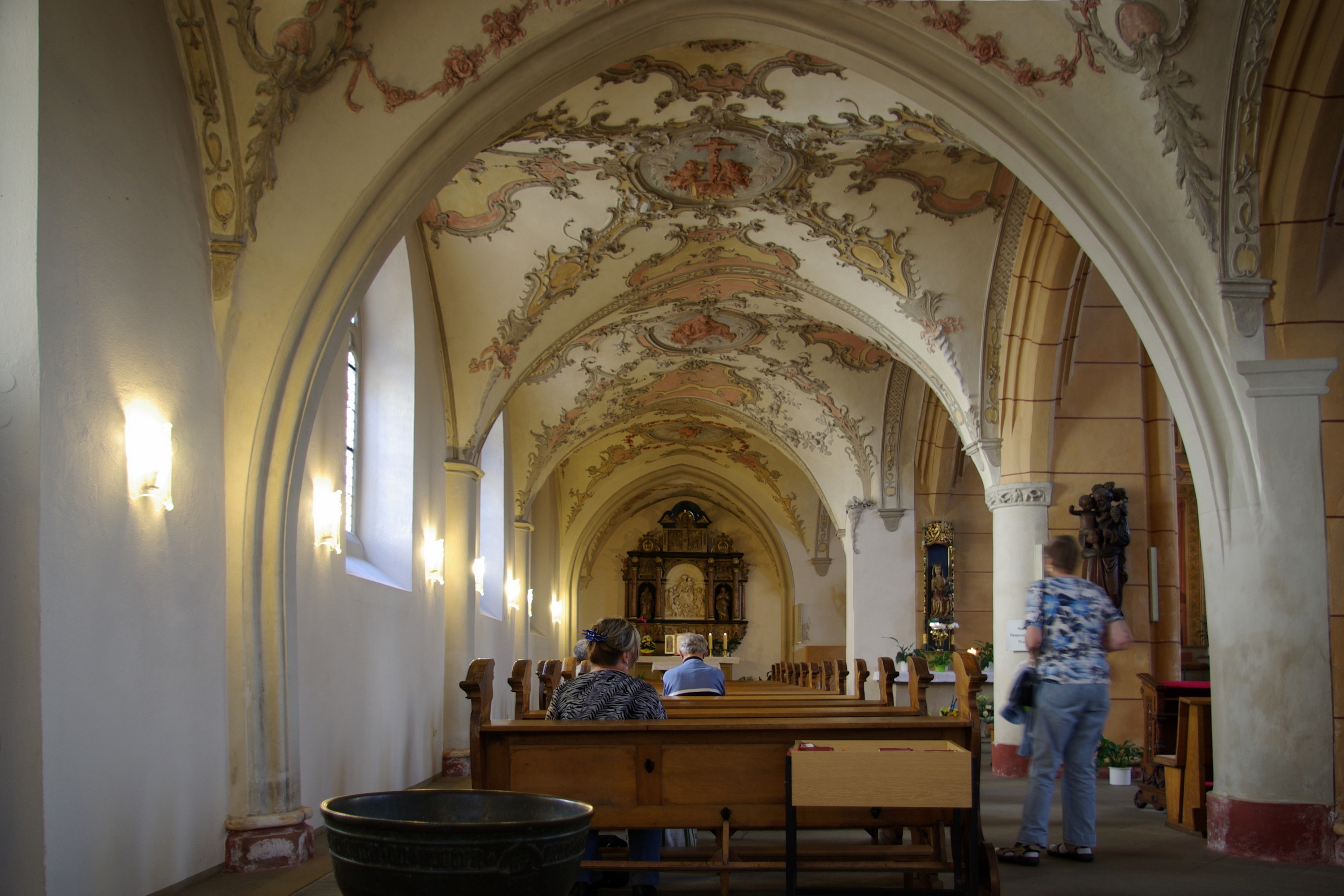 Trier, St. Gangolf, Seitenschiff